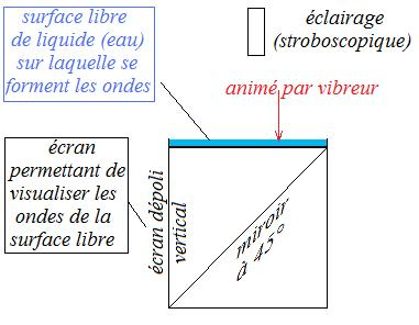 Dispositif expérimental pour créer et observer des ondes de surface d'un liquide (cuve à ondes)